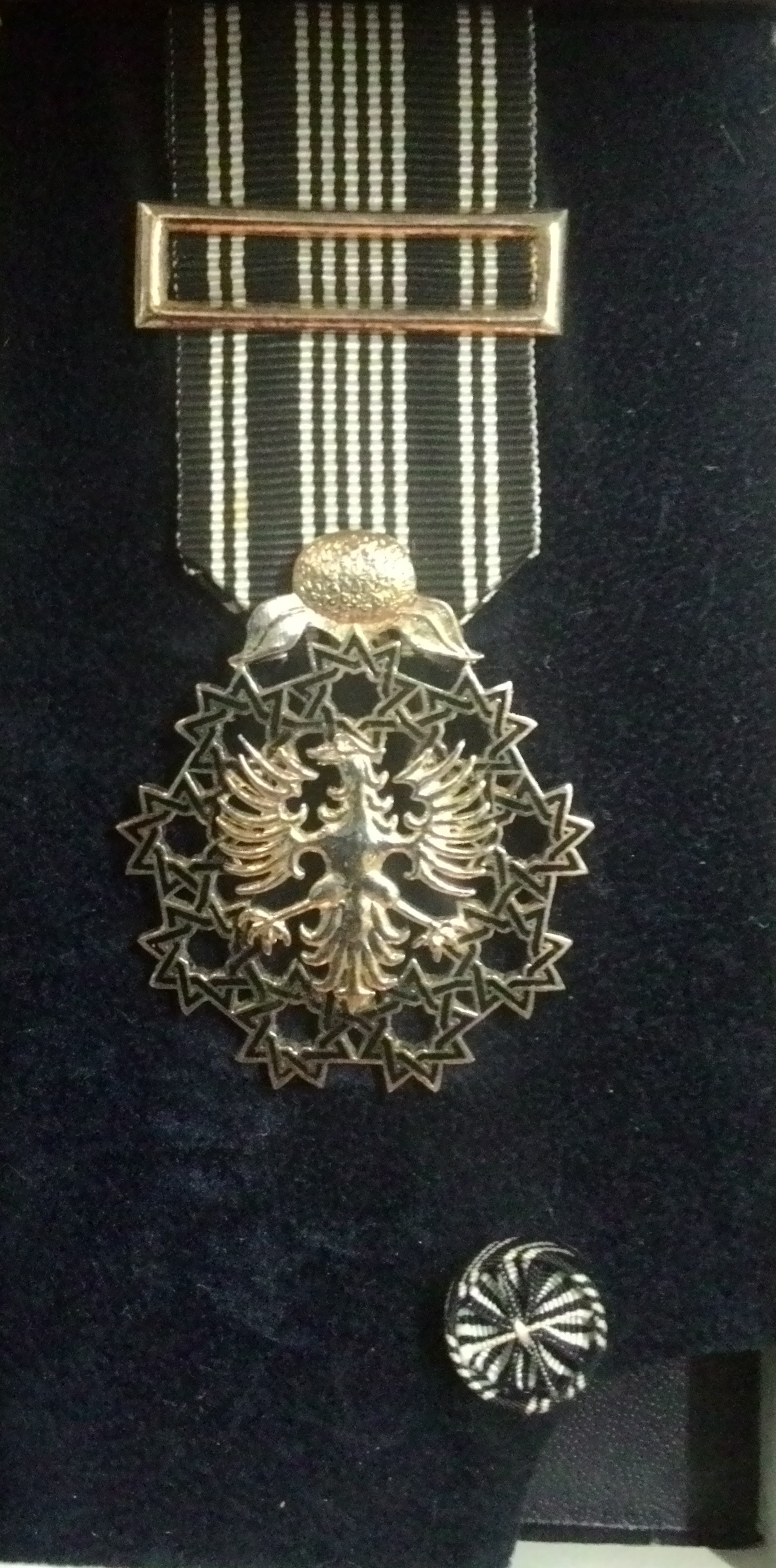 Insignia autonomica de merito profissional